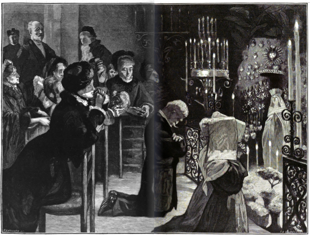 La chapelle de la Vierge dans l’Église de Jésus de la maison mère des Jésuites, rue de Sèvres à Paris.